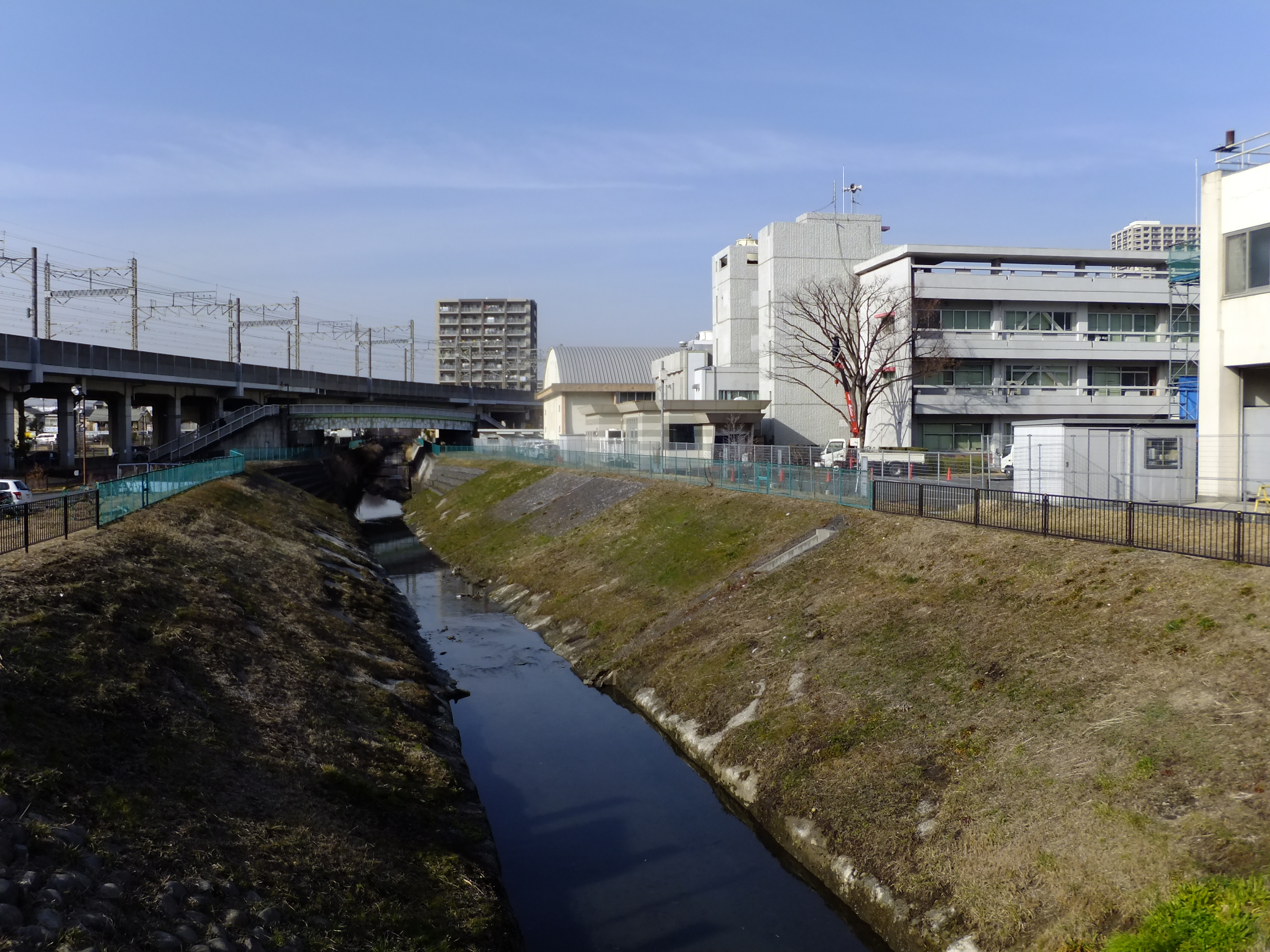 霧敷橋（さいたま市中央区）から見た鴻沼川